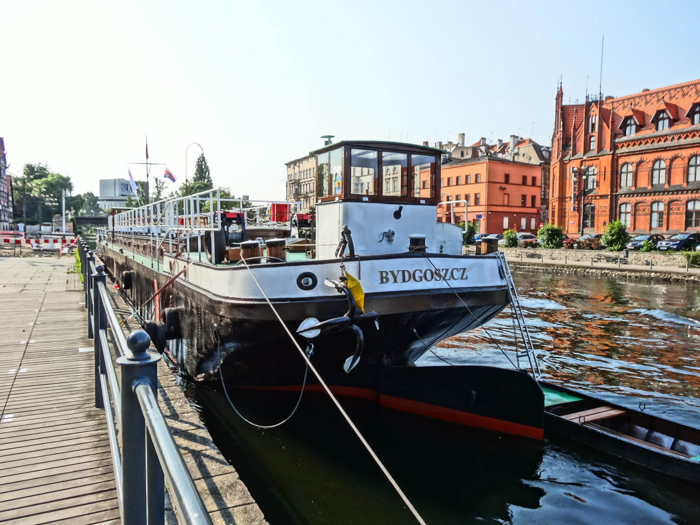 Nabrzeże Brdy w centrum Bydgoszczy. Barka Lemara przeznaczona na muzeum